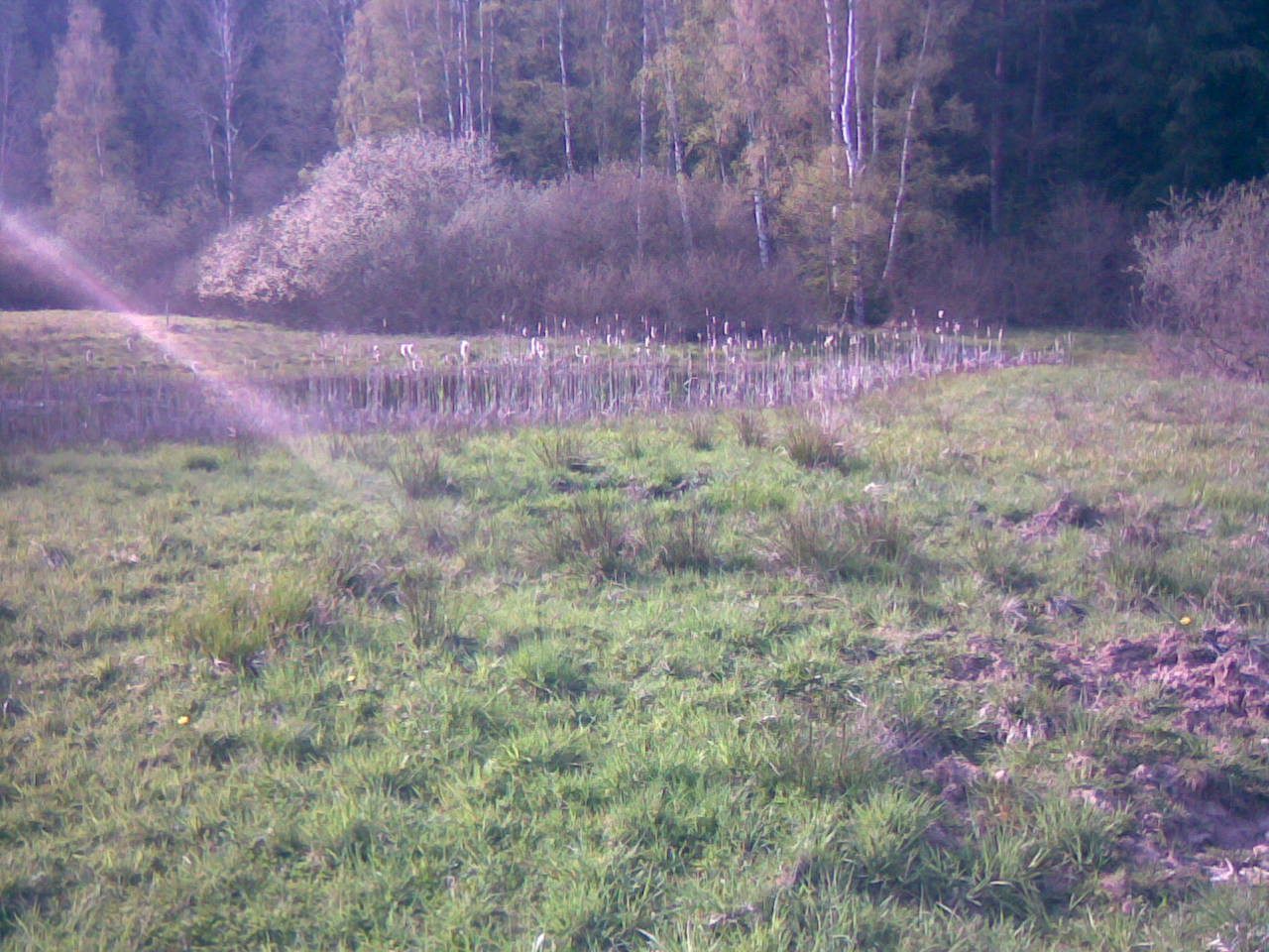 Divisov march